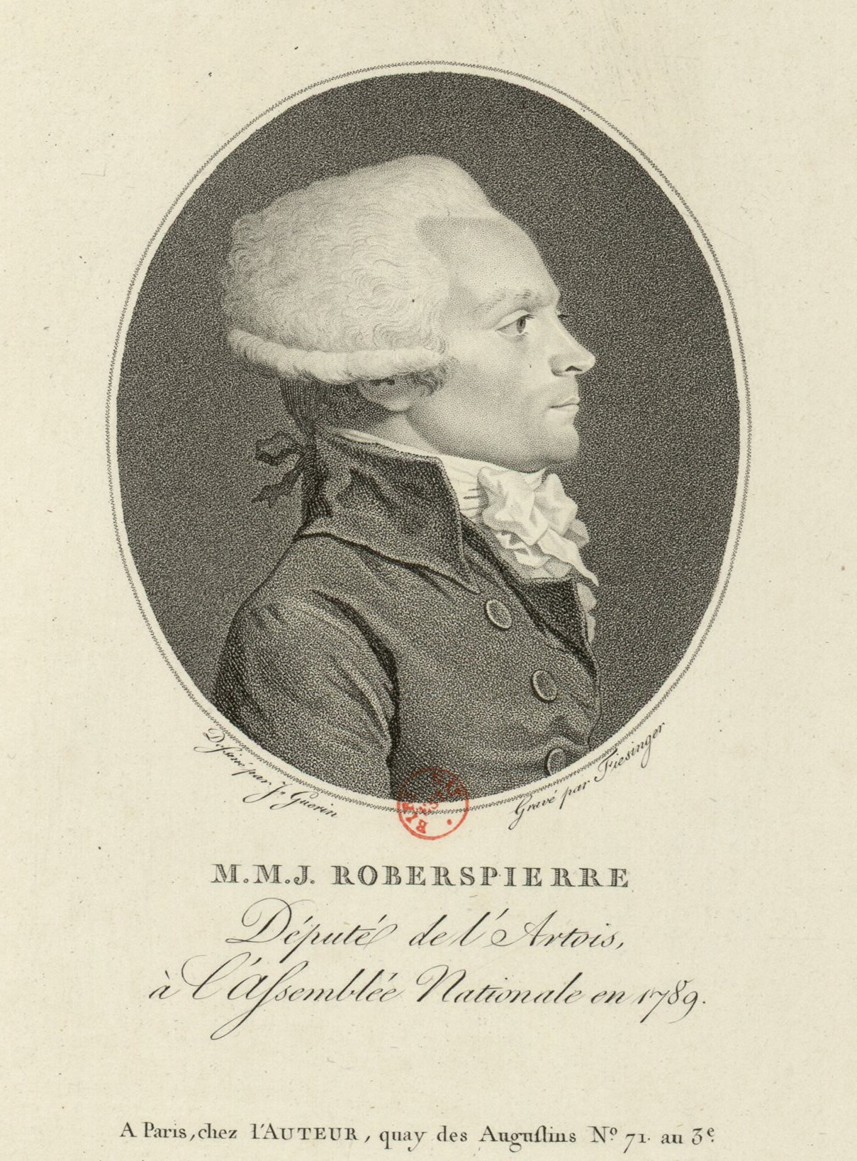 Maximilien de Robespierre, député de l'Artois à l'Assemblée nationale en 1789 : estampe (1789)